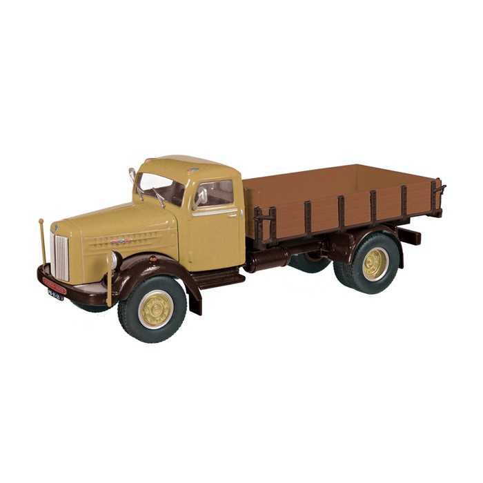 SCANIA L60 NZG Modell